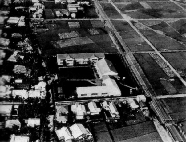 調布学園の航空写真。右に複線時代の新奥沢線が見える。